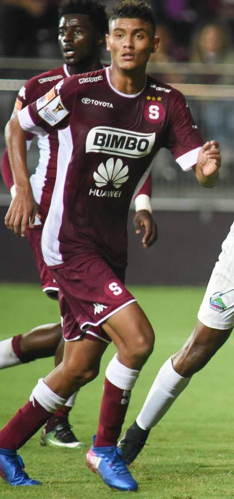 Saprissa 2-1 San Carlos. Campeonato Verano 2017, Jornada 12. Sábado 25 de febrero, 2017. Estadio Ricardo Saprissa. Fotografía: Luis Alvarado.